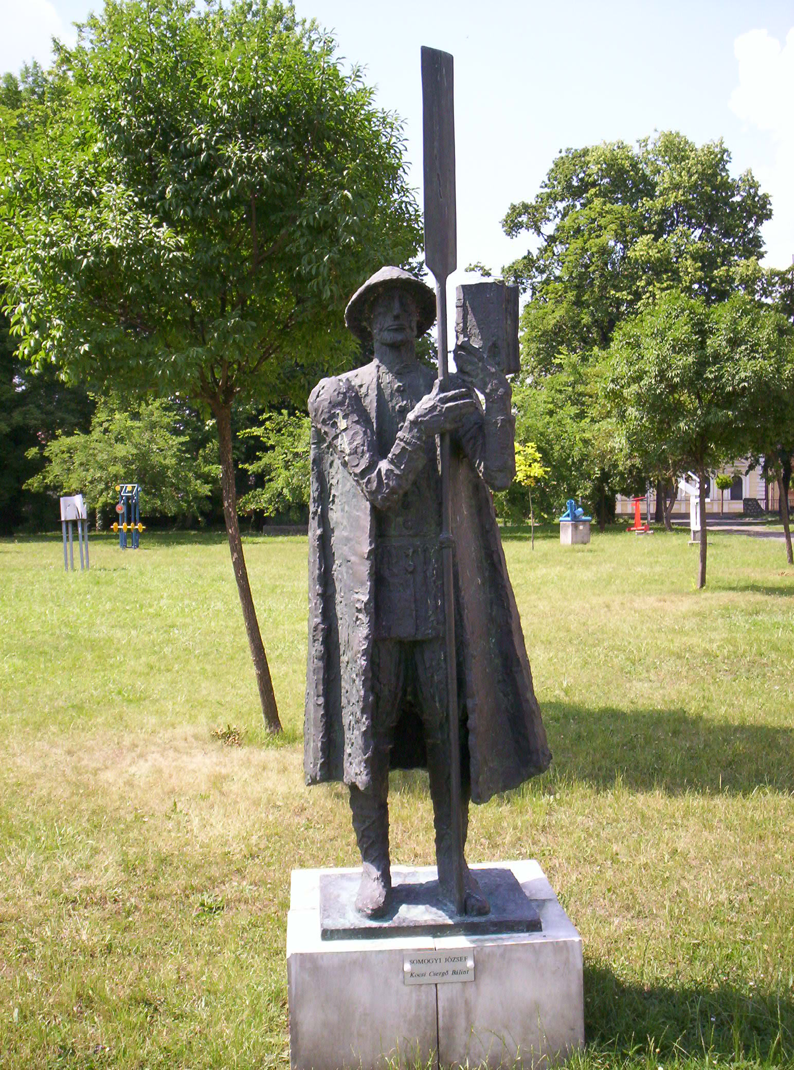 Bálint Kocsi Csergő, Hungarian protestant evangelist and galley slave of the 17th century. József Somogyi's statue in Köztársaság Liget, Pápa, Hungary. Kocsi Csergő Bálint, 17. századi református prédikátor és gályarab. Somogyi József szobra a pápai Köztársaság Ligetben.